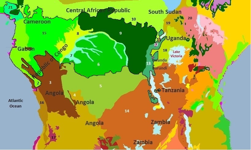 Ecoregioni che compongono la foresta pluviale del Congo